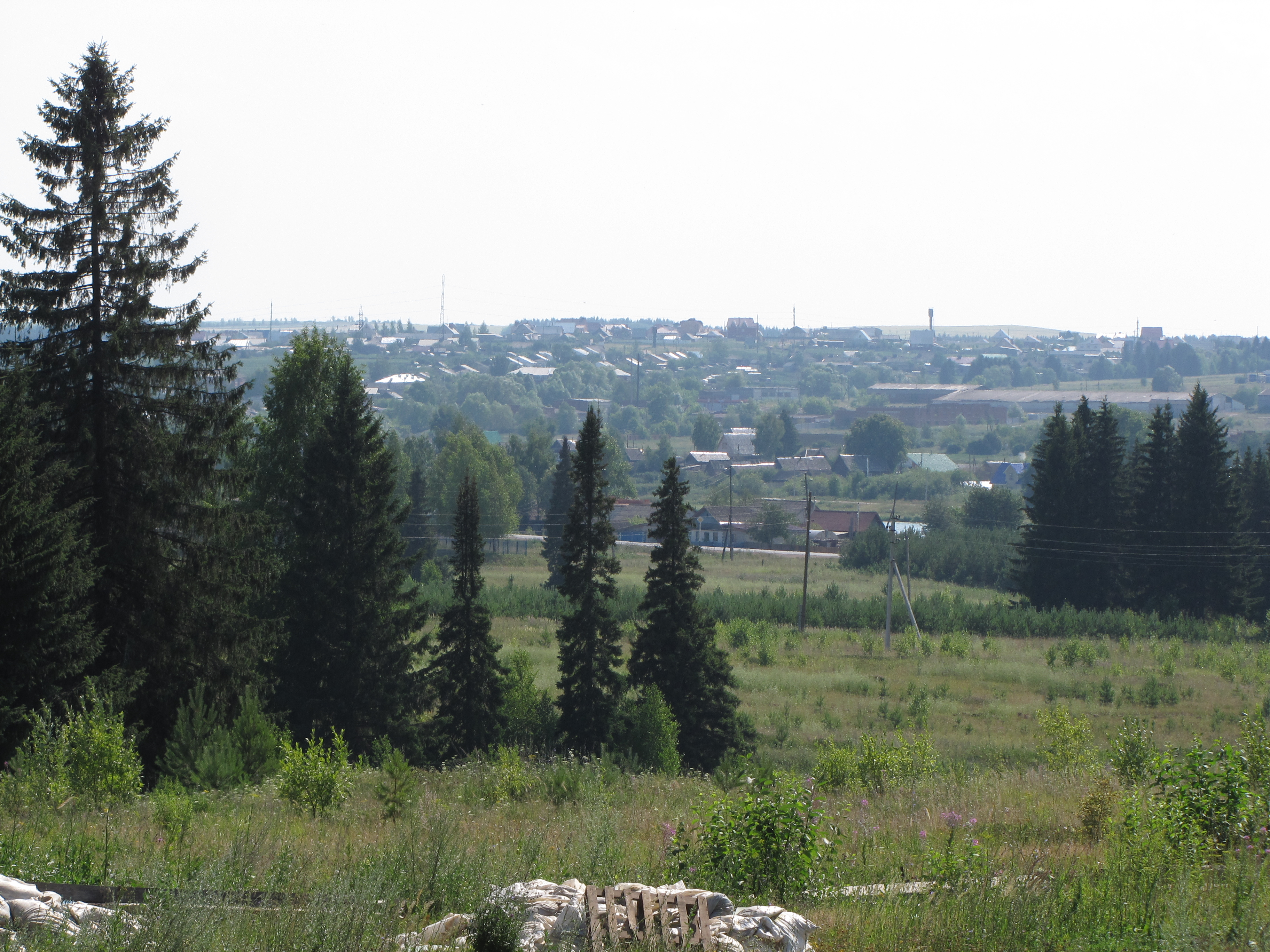 Ижевск